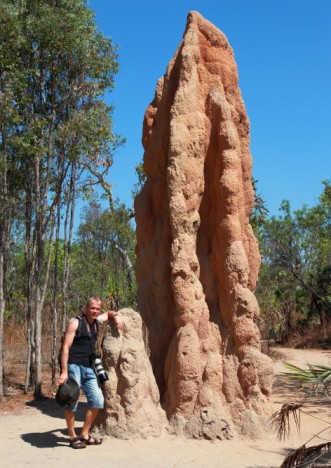 Австралиядағы термиттердің илеуі